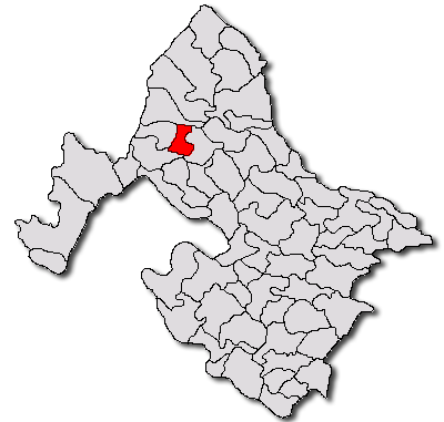 Categorie:Hărţi ale judeţului Mehedinţi